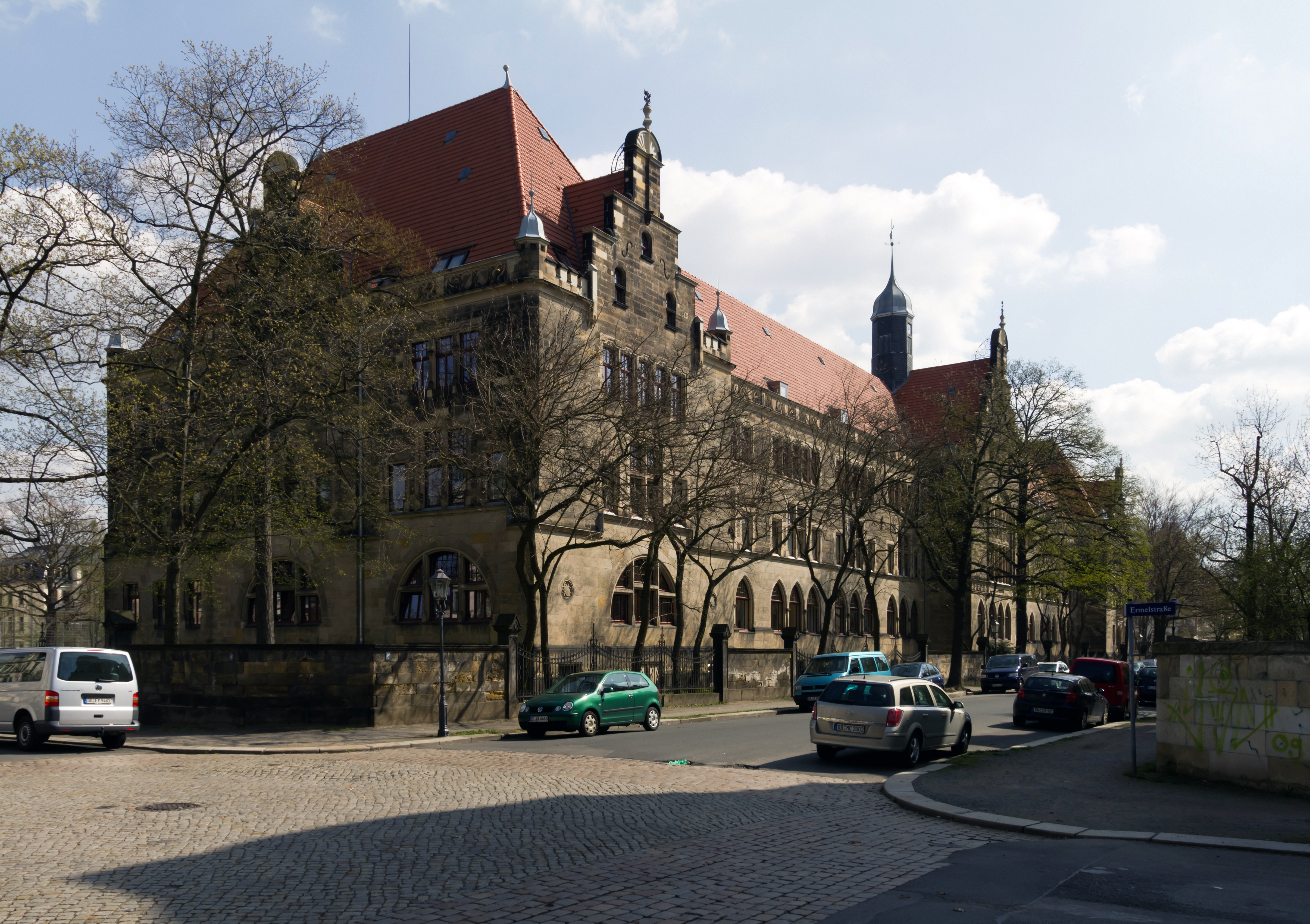 Kreuzschule, Dornblüthstraße 4, Dresden